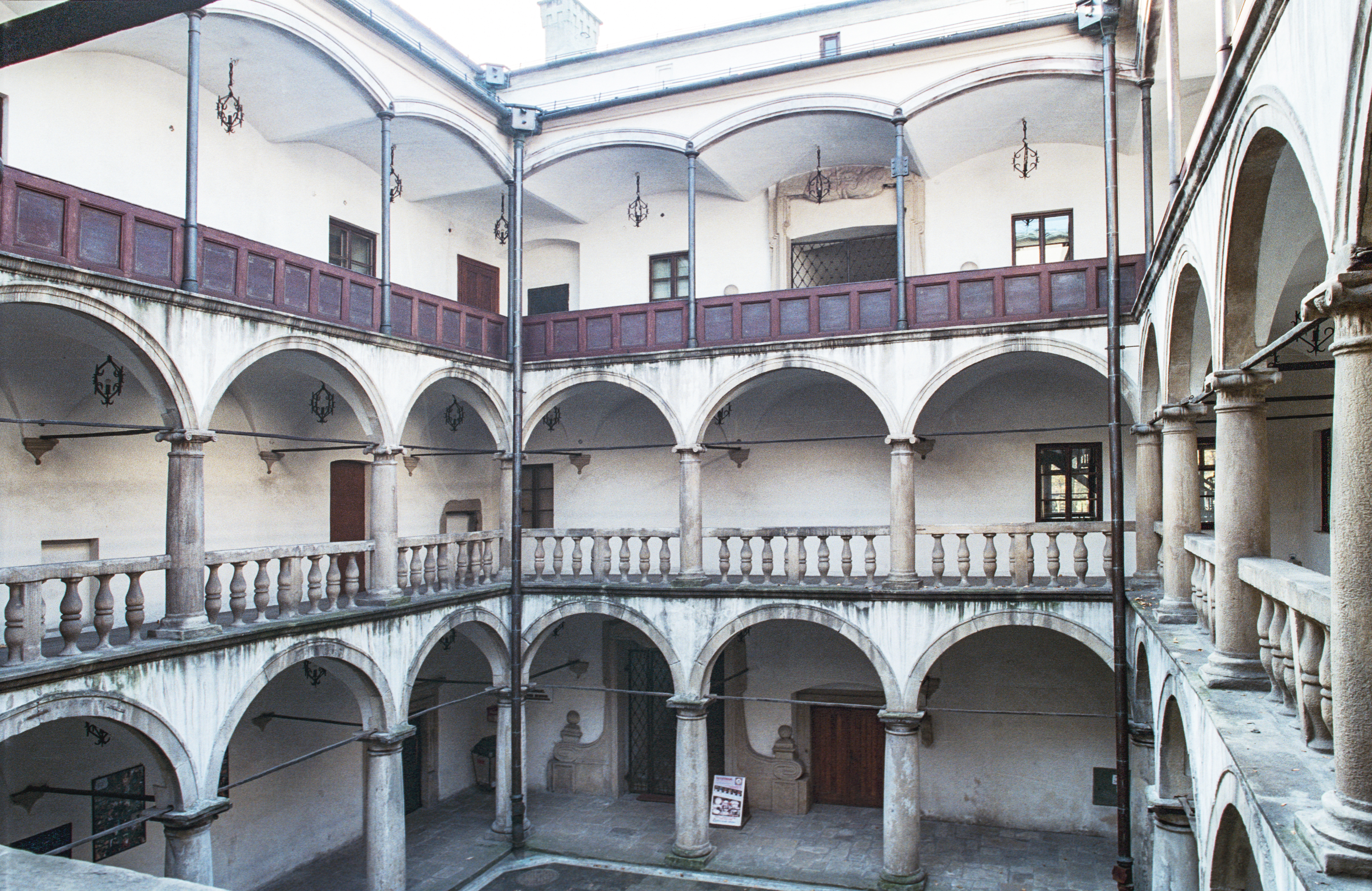 zamek w Żywcu, krużganki